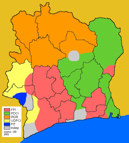 Results / Résultats Côte d'Ivoire Elections 2002; Wahlergebnisse 2002